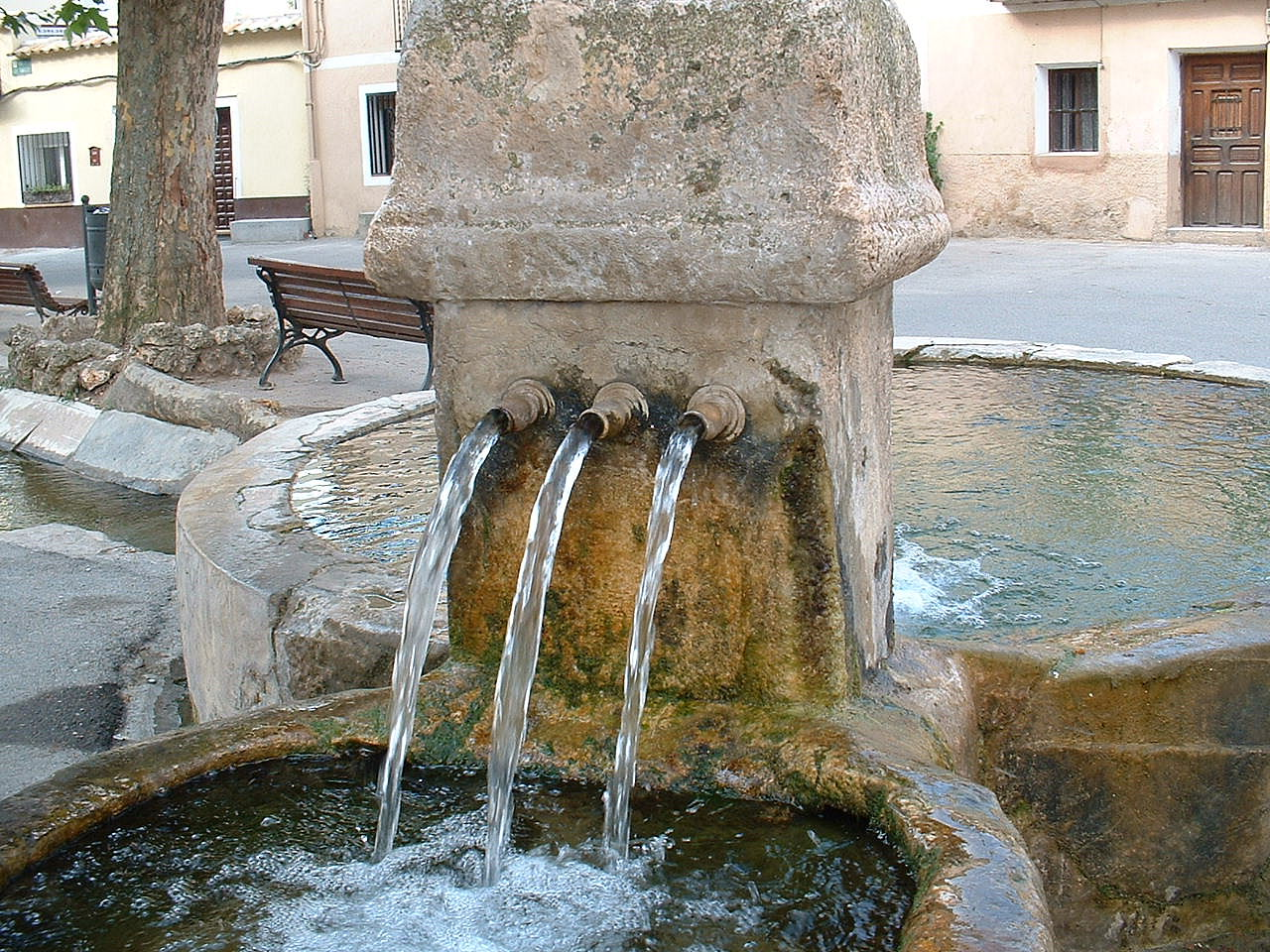 Fuente de la plaza de Yélamos de Arriba, en la provincia de Guadalajara (España)